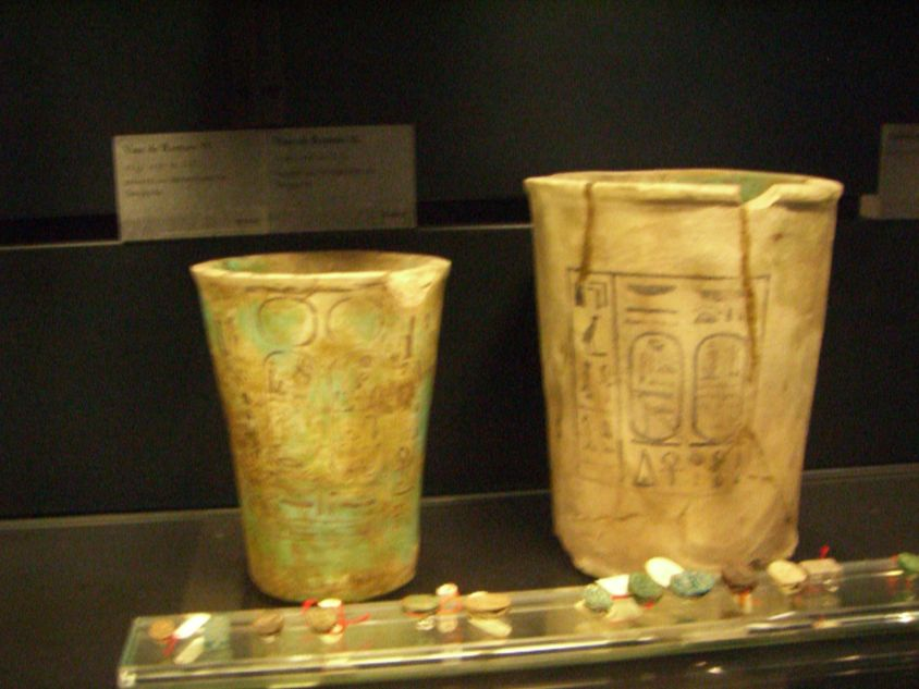 Vases aux noms de Ramsès VI et Ramsès IX provenant du Sérapéum de Saqqarah - XXe dynastie égyptienne - Musée du Louvre